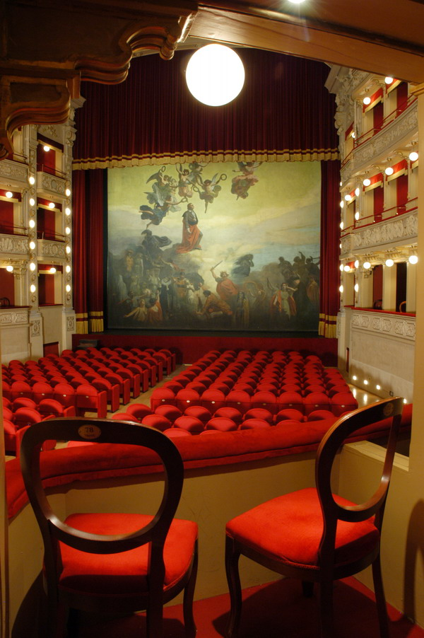 Sala del Teatro Vittorio Alfieri vista dalla Barcaccia